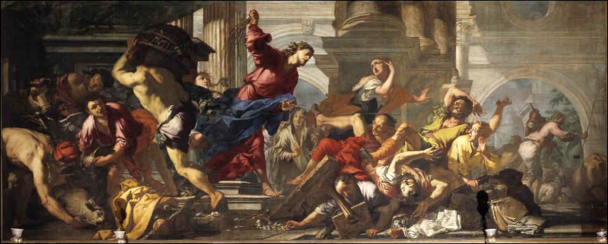 Cacciata dei mercanti dal Tempio